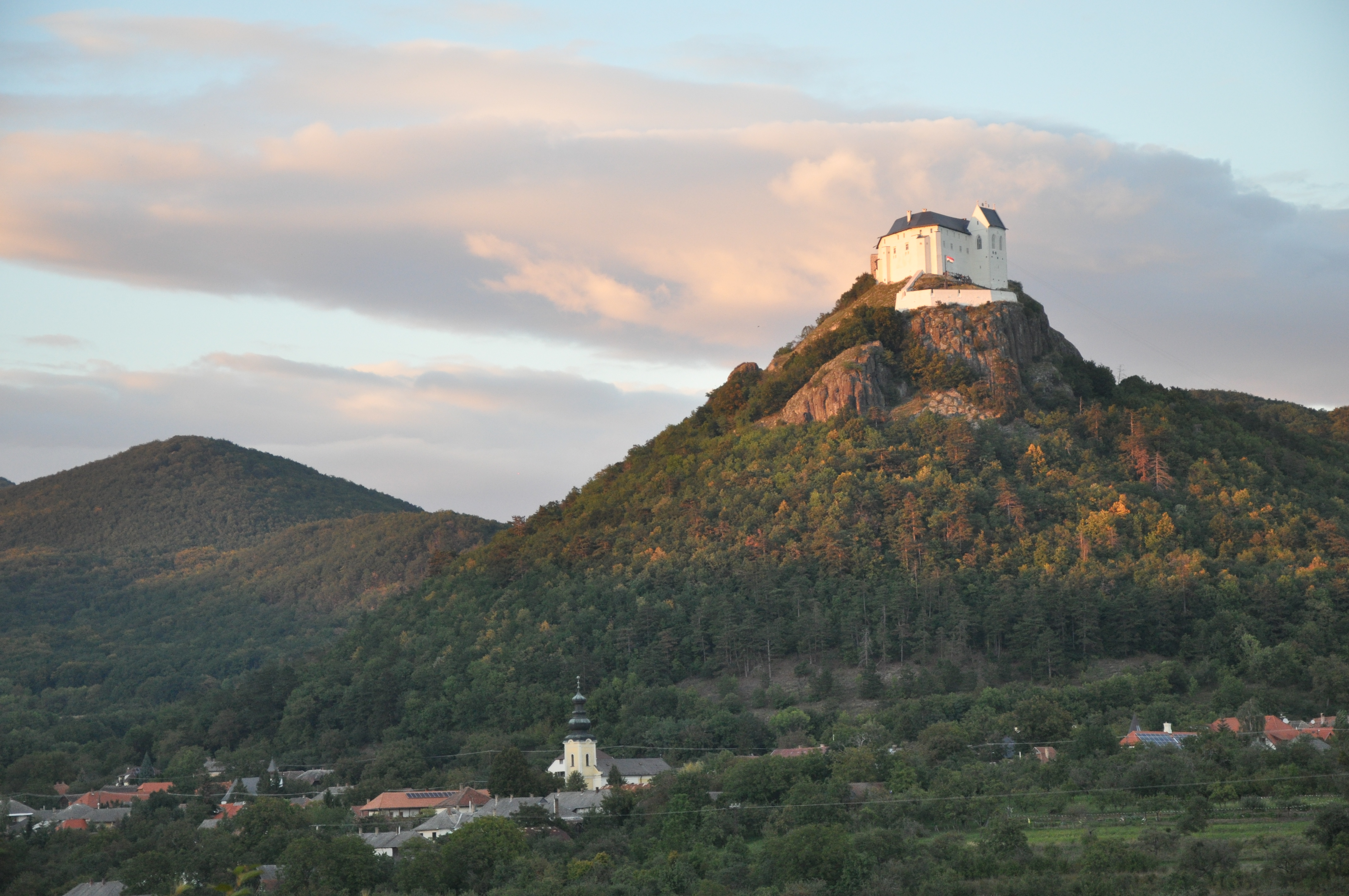 Füzér, a legészakibb magyar falu